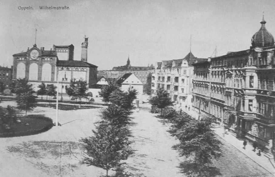 Opole, Wilhelmsplatz i Browar (przed 1939). Obecnie plac Kopernika